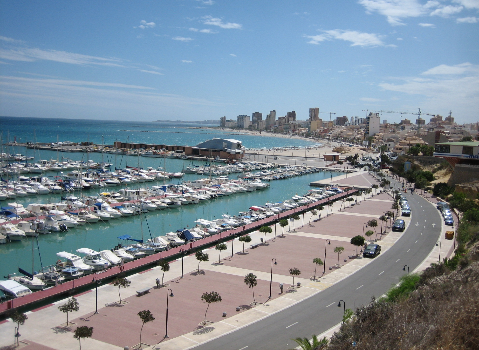 Puerto de Campello Vista del puerto de Campello (provincia de Alicante, España). En un segundo plano se puede apreciar la fachada marítima de la localidad, el paseo marítimo y la playa urbana. Al fondo, se divisa el Cabo de las Huertas. Fecha: 17/08/2006 Autor: Rodriguillo